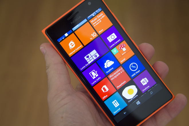 Ein Lumia 735 mit Coverfarbe orange